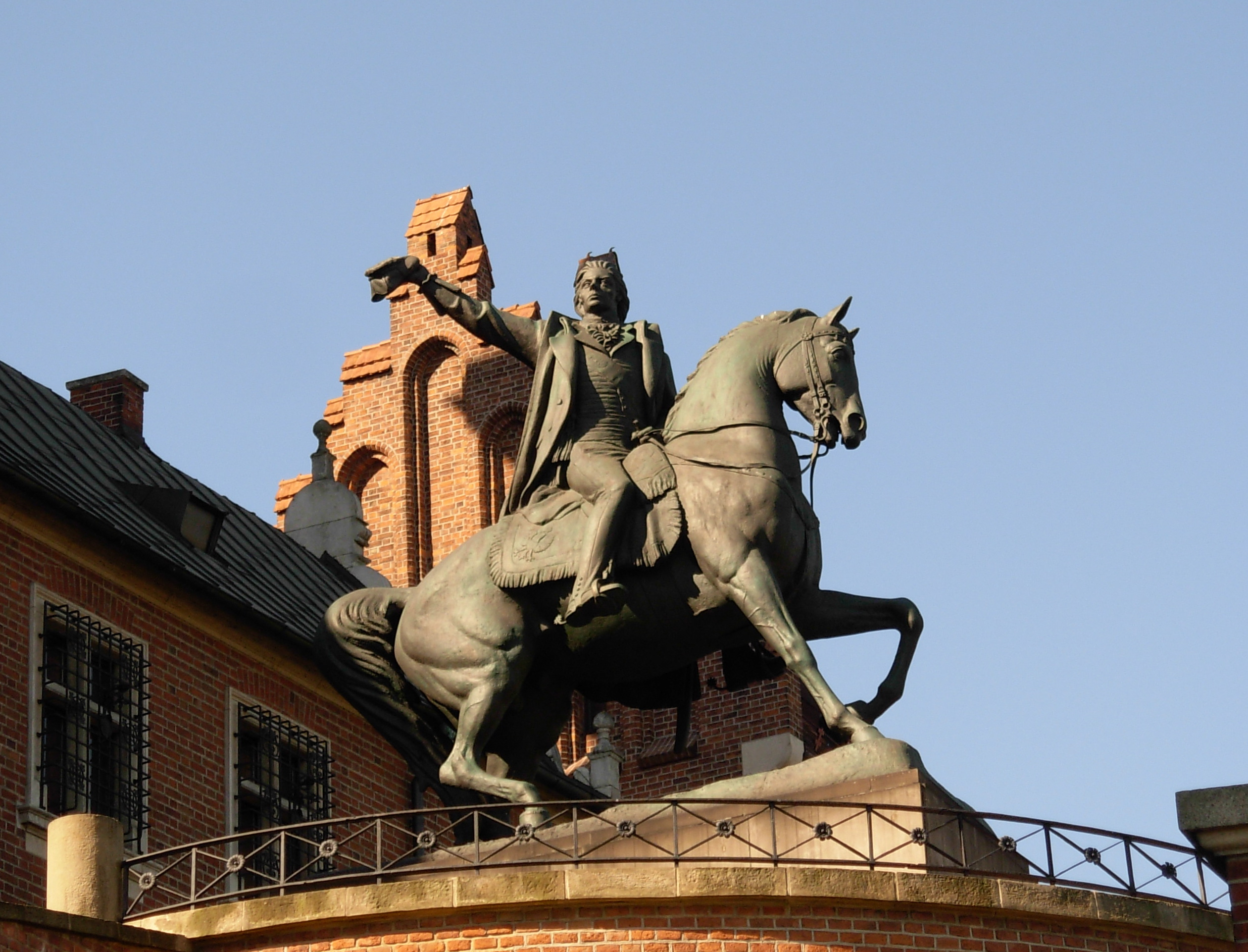 Tadeusz Kościuszko Monument in Kraków